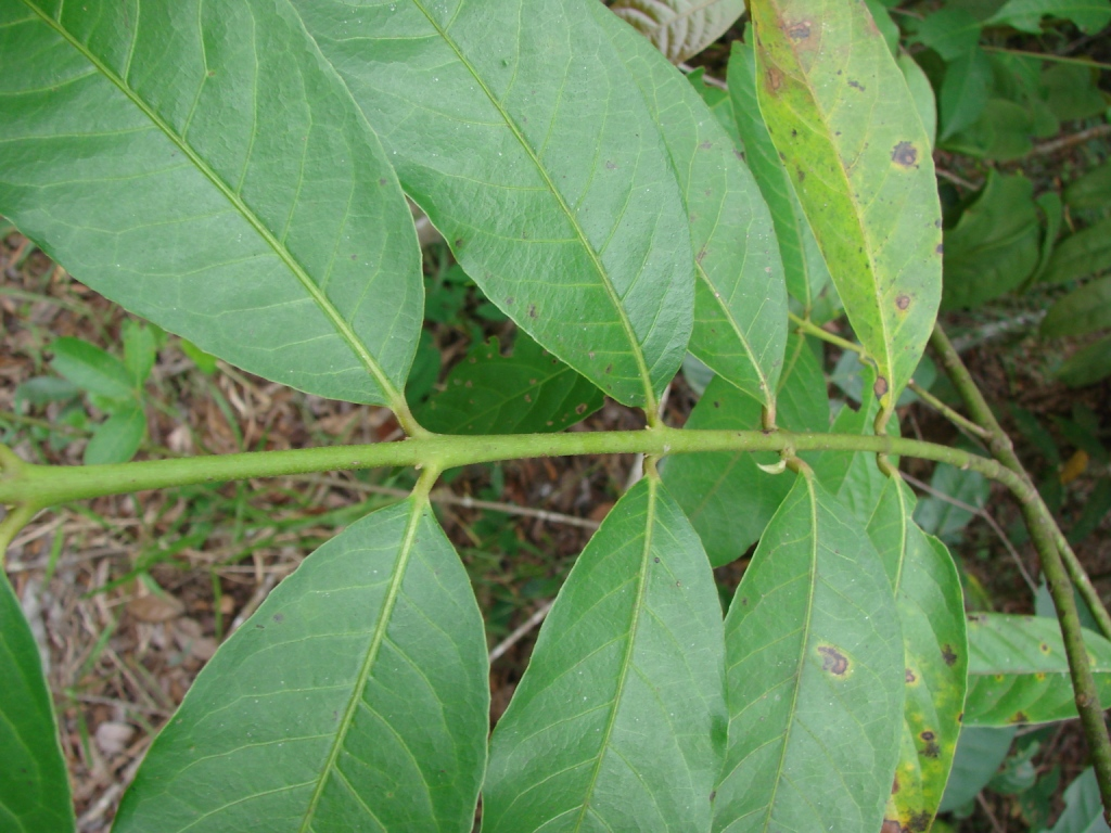 Siparuna guianensis - SIPARUNACEAE Parque Estadual Serras de Caldas Novas - Caldas Novas - Goiás - Brasil.